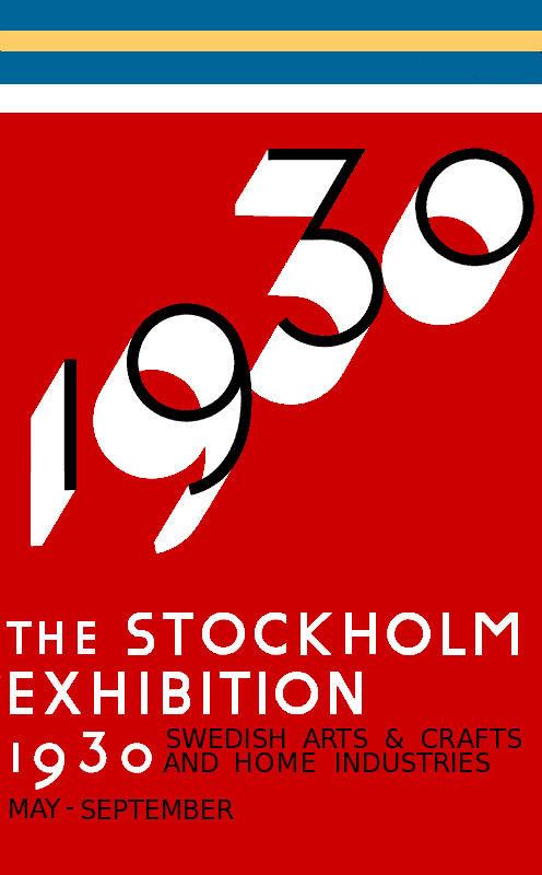 Stockholmsutställningen Plakat